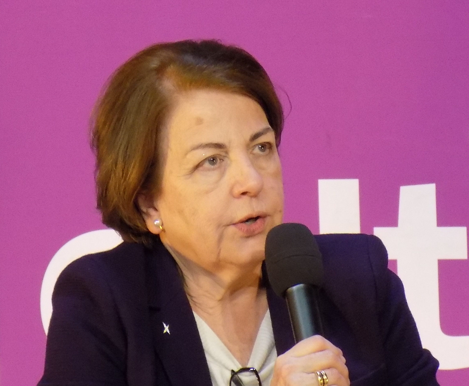 Anny-Chantal Levasseur-Regourd lors du forum « L’année vue par… les sciences » organisée par France Culture le 14 février 2015